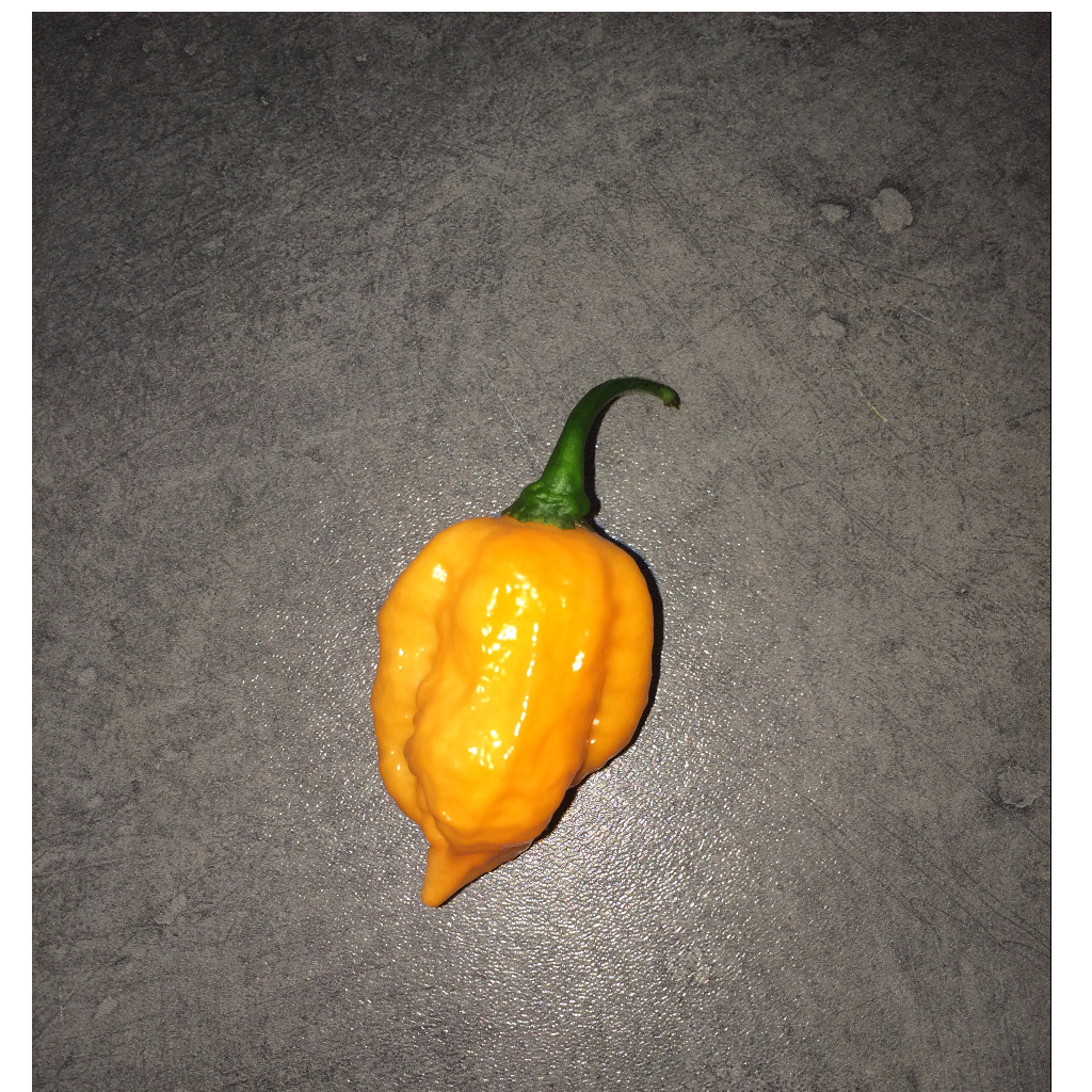 Dansk Chilifrugt